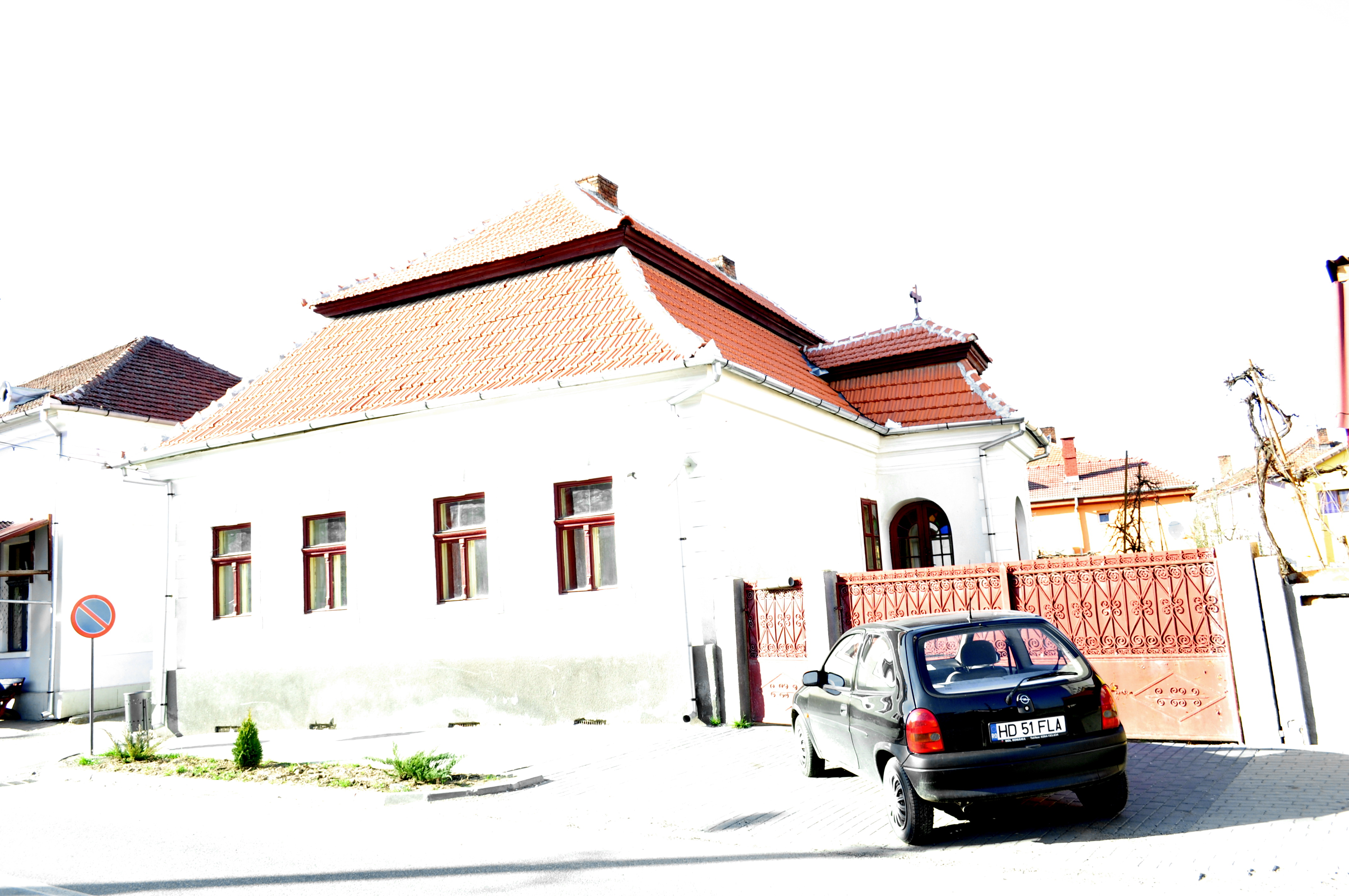 Casa parohială ortodoxă